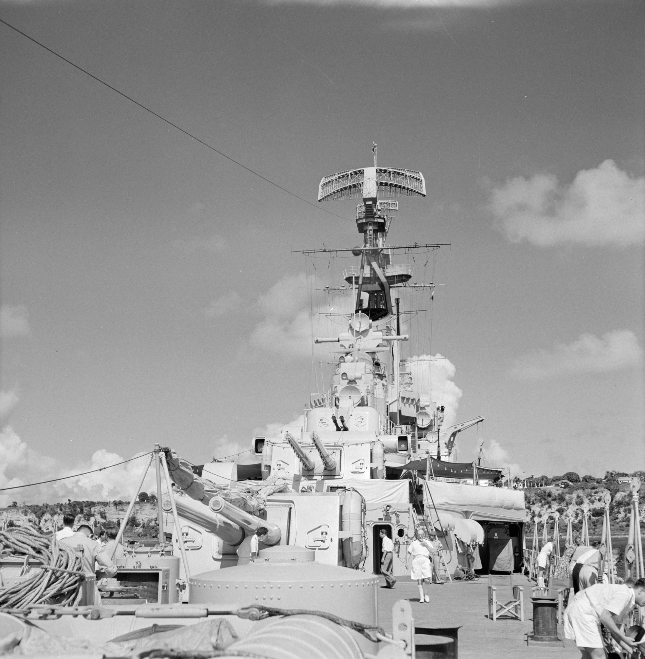 Collectie / Archief : Fotocollectie Van de Poll Reportage / Serie : Nederlandse Antillen en Suriname ten tijde van het koninklijk bezoek van koningin Juliana en prins Bernhard in 1955 Beschrijving : H.M. kruiser De Ruyter in Willemstad Datum : oktober 1955 Locatie : Aruba, Nederlandse Antillen, Willemstad Trefwoorden : schepen Fotograaf : Poll, Willem van de Auteursrechthebbende : Nationaal Archief Materiaalsoort : Negatief (zwart/wit) Nummer archiefinventaris : bekijk toegang 2.24.14.02 Bestanddeelnummer : 252-4041